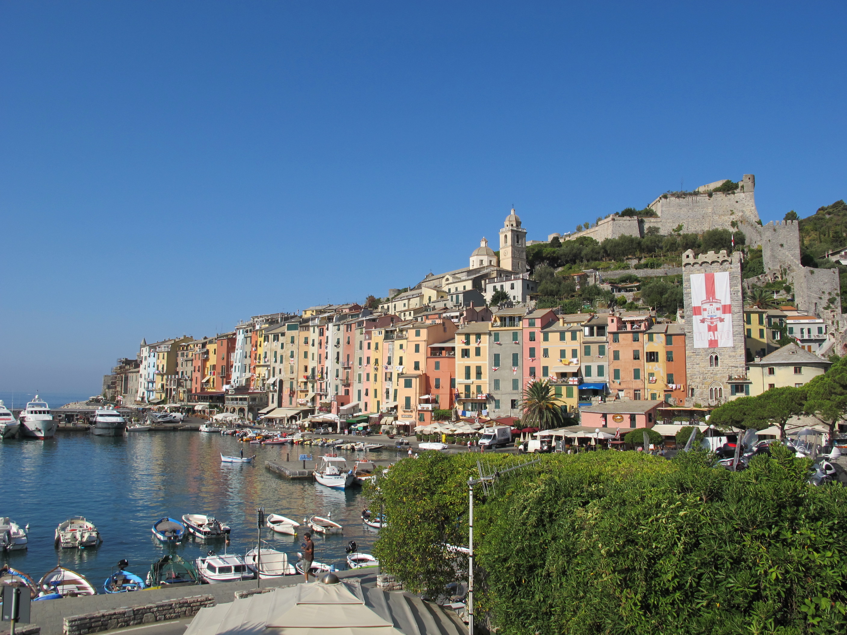 Portovenere